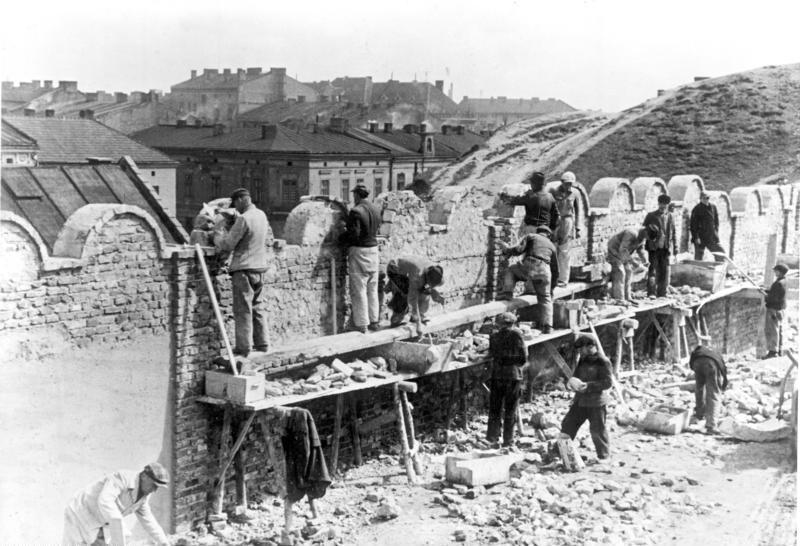 Polen, Bau der Mauer für ein Ghetto ADN-ZB/Archiv II. Weltkrieg 1939-45 Judenverfolgung durch die faschistischen deutschen Besatzungstruppen in Polen, Mai 1941; Bau der Mauer für das Ghetto einer Stadt im Generalgouvernement [Krakau?] 5211-41